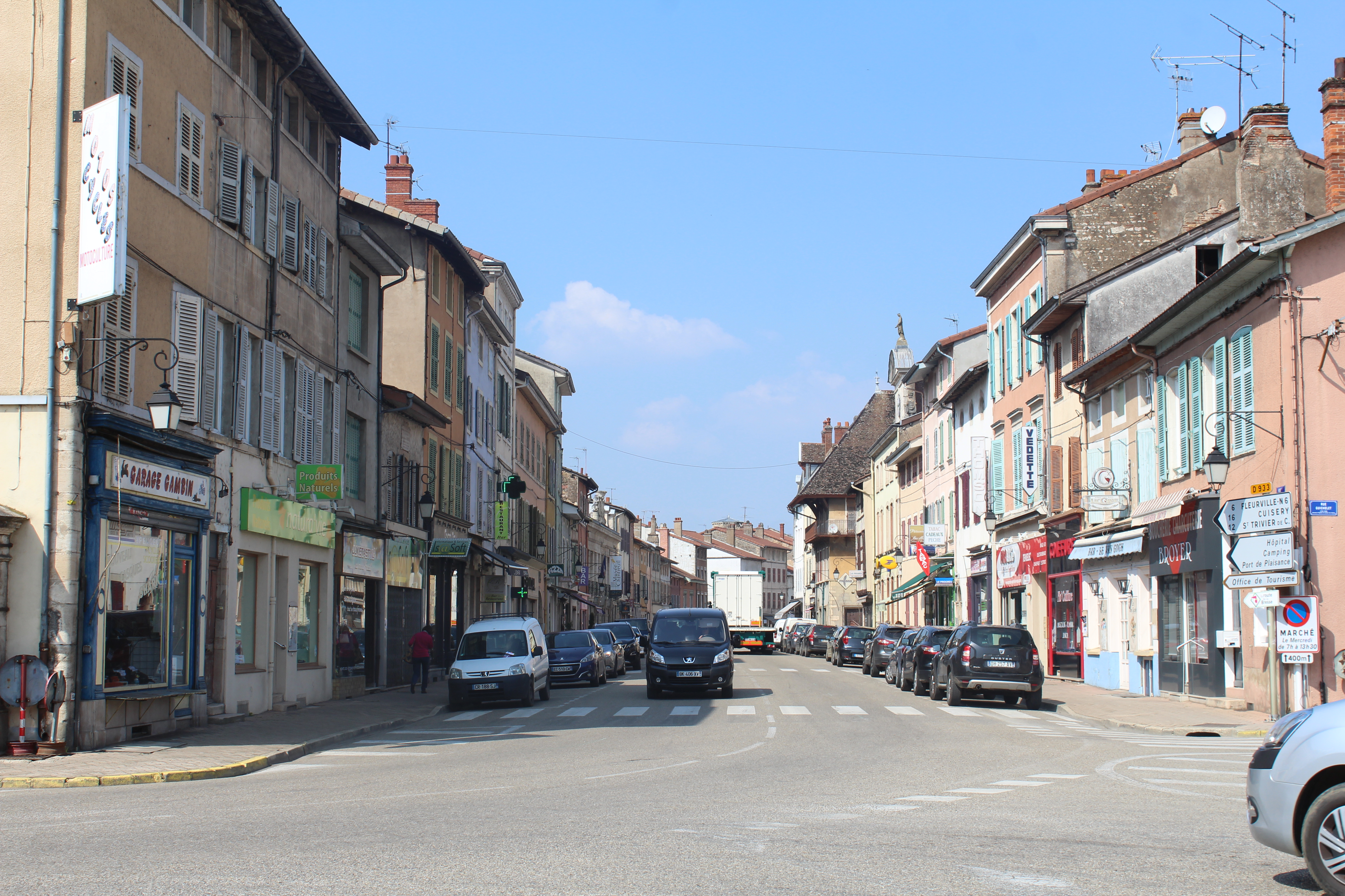 Rue de Lattre de Tassigny, Pont-de-Vaux.